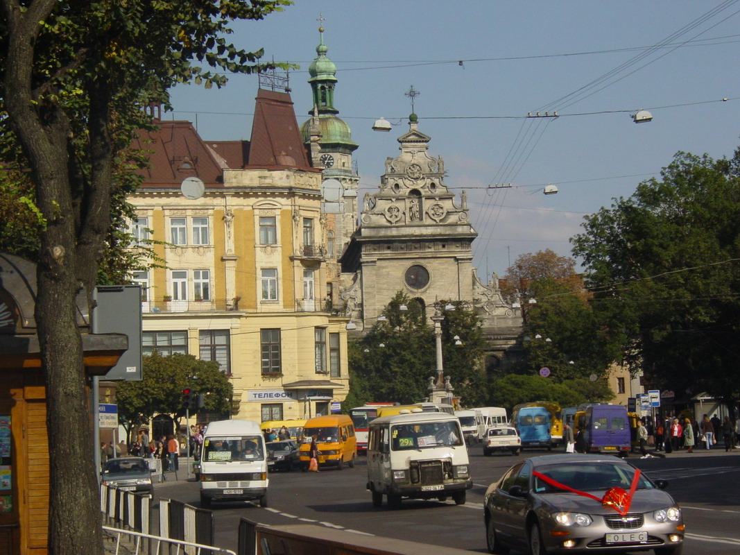 Lwów, kościół Bernardynów, wrzesień 2003, Autor fot. Stanisław Kosiedowski